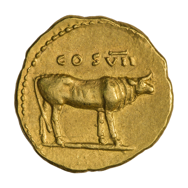 Ауреус. Веспасиан. Ок. 76 г. (реверс). Надпись COS VII. Корова стоит, вправо.